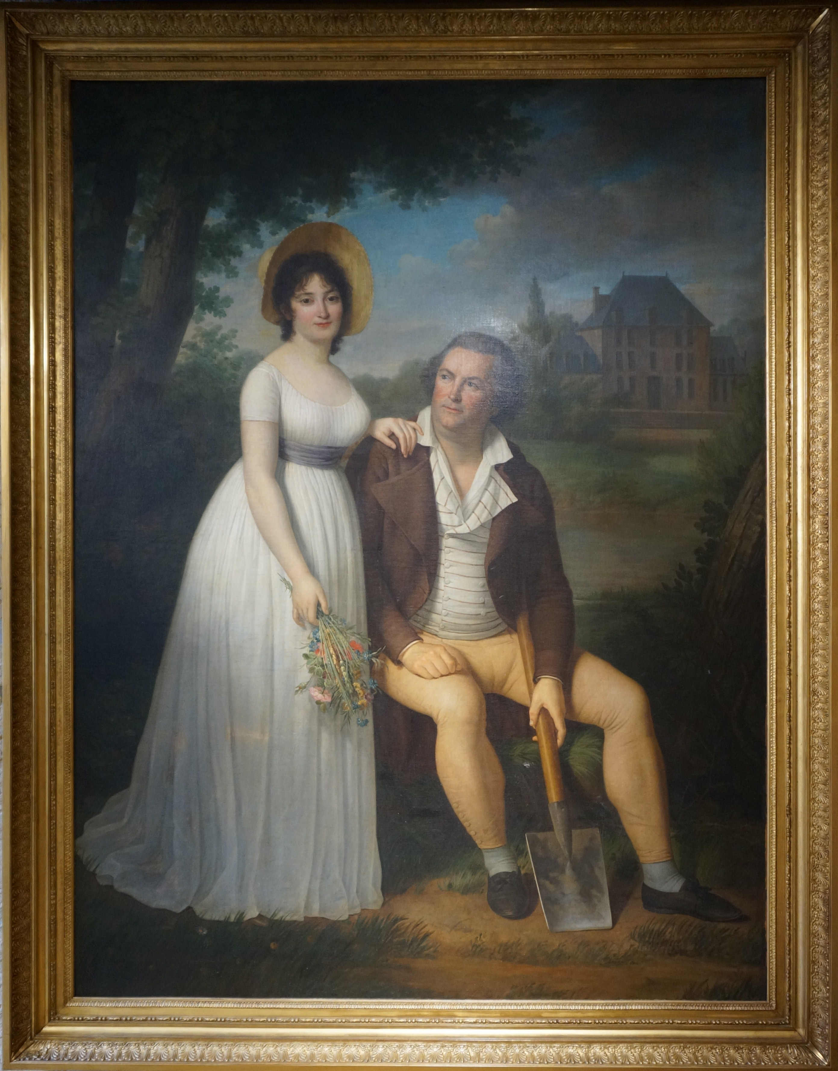 Dubois_Crancé_en sa demeure à Balham avec son épouse.